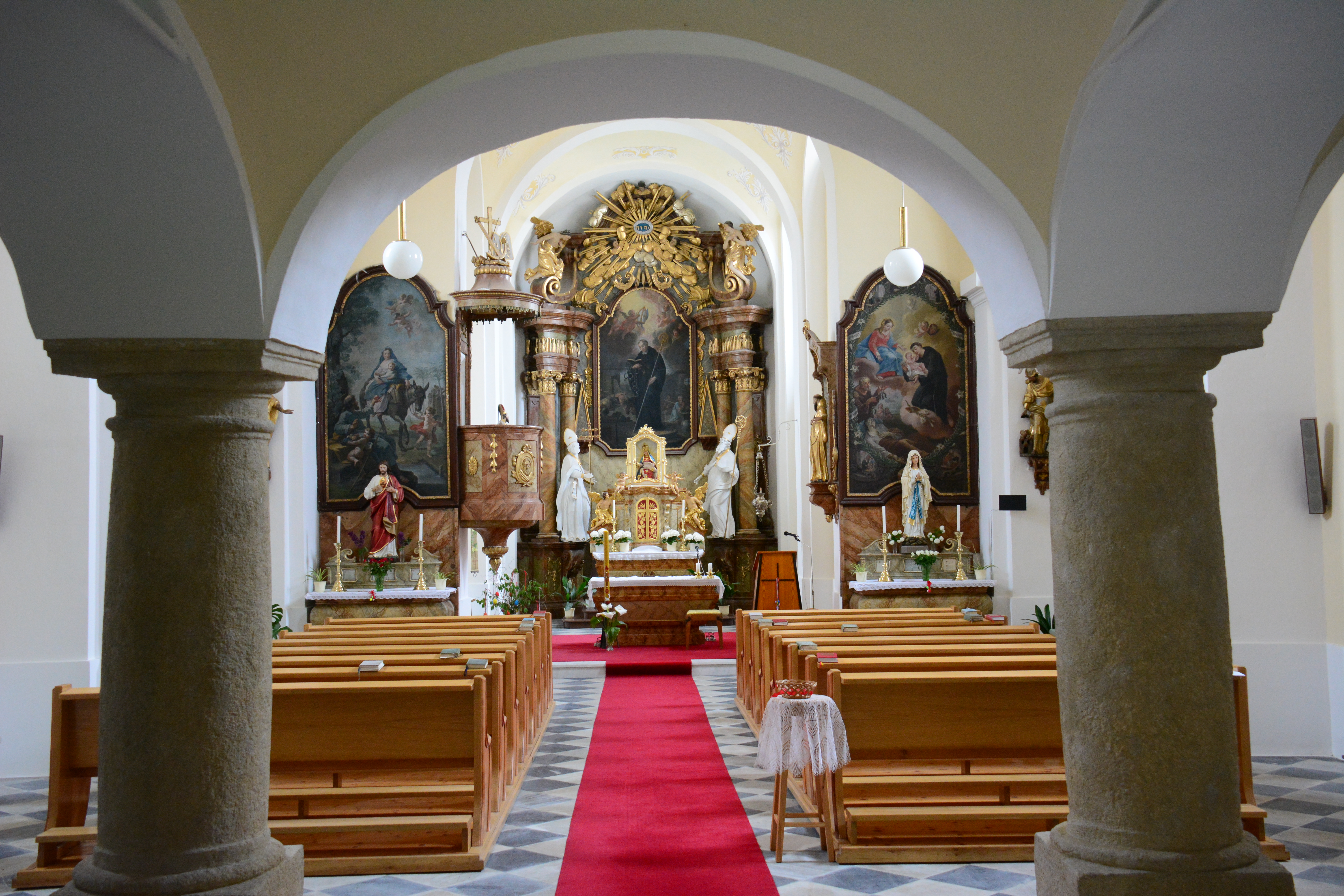 Das Innere der Kirche von Havraníky/Kaidling in Südmähren